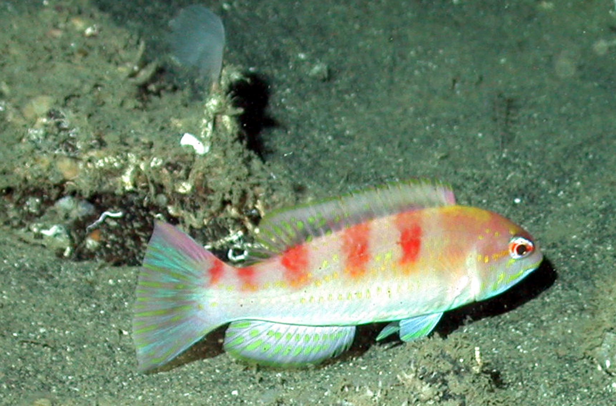 Decodon puellaris Atlantic Ocean, Southeast U.S. shelf/slope area